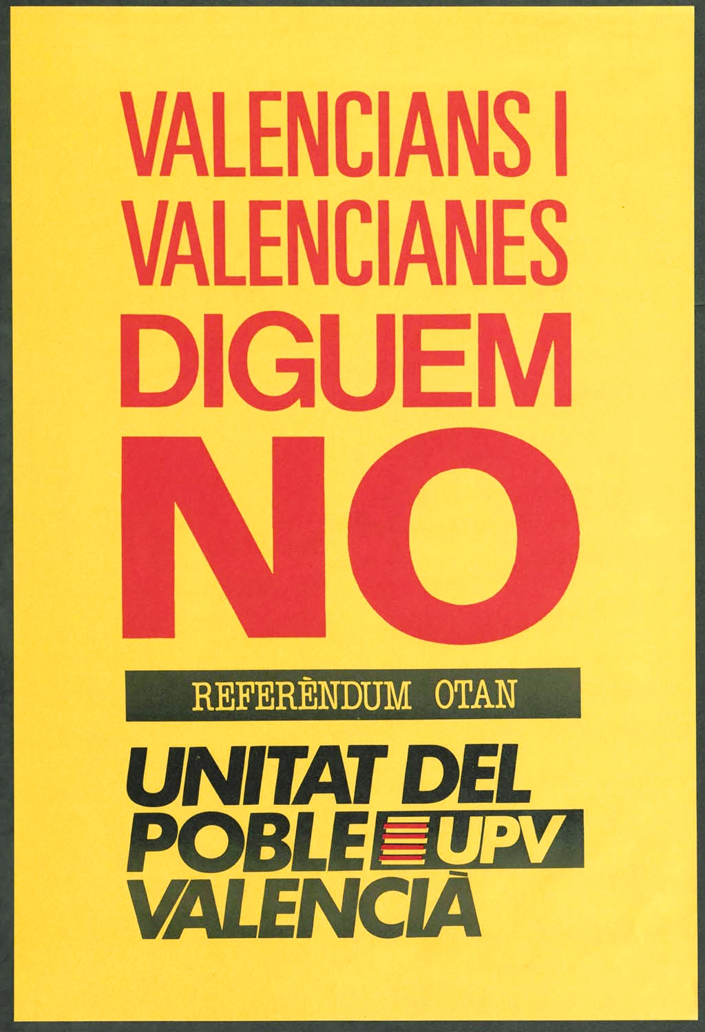 Cartell de la Unitat del Poble Valencià defensant el NO al referèndum de pertinença a l'OTAN